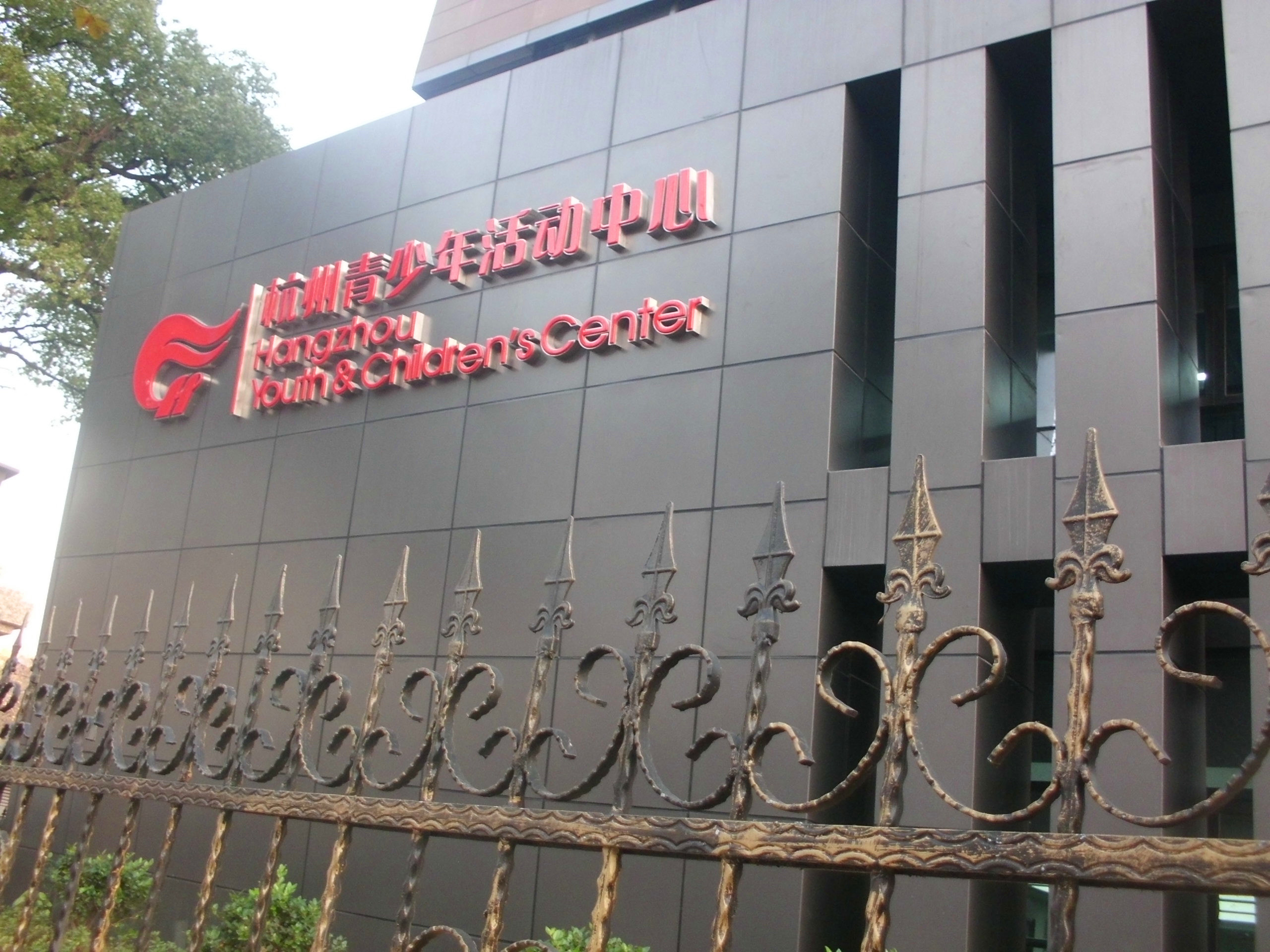 北大门的LOGO